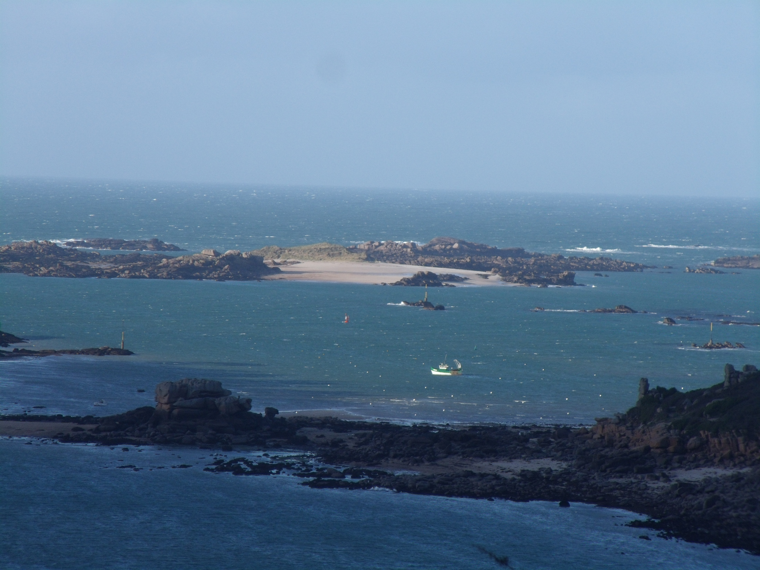 L'Île Molène à Trébeurden, vue de la pointe de Bihit.